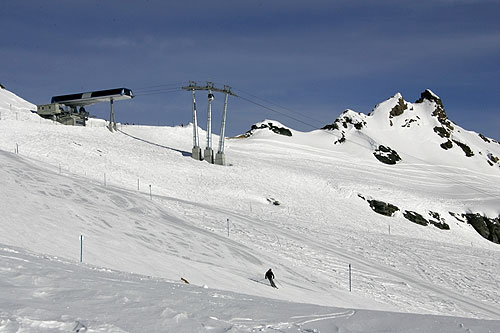 Gletscherbahn Lauchernalp